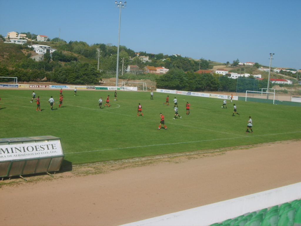 Jogo de Futebol, SCL vs Benfica